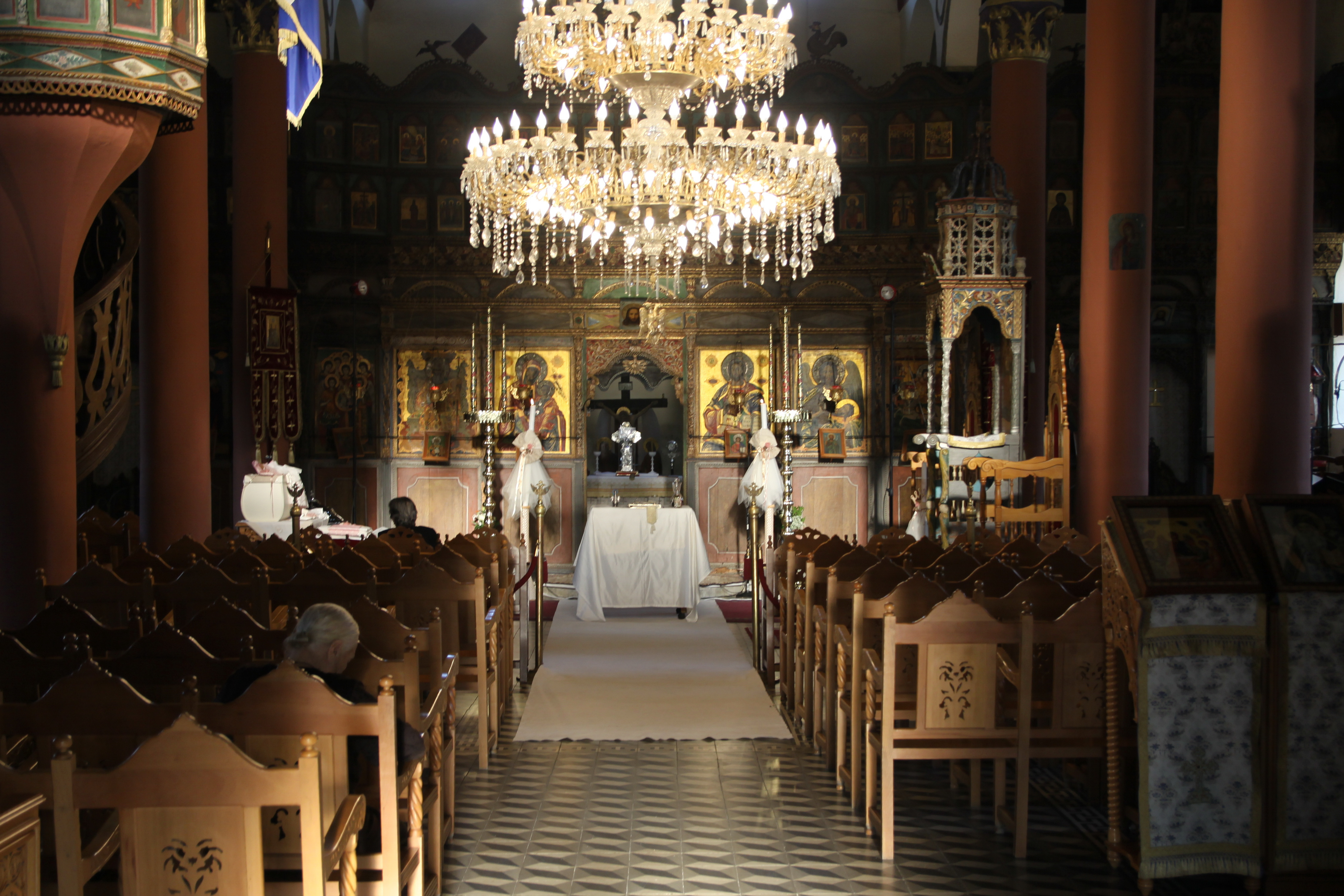 Ναός Αγίου Αθανασίου Συκιάς (Εσωτερικό)«Ναός Αγίου Αθανασίου Συκιάς»